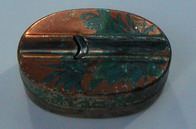 Taille-crayon rabot - Objet personnel - Photo prise par moi même - LessayCatus 19:51, 3 December 2006 (UTC)